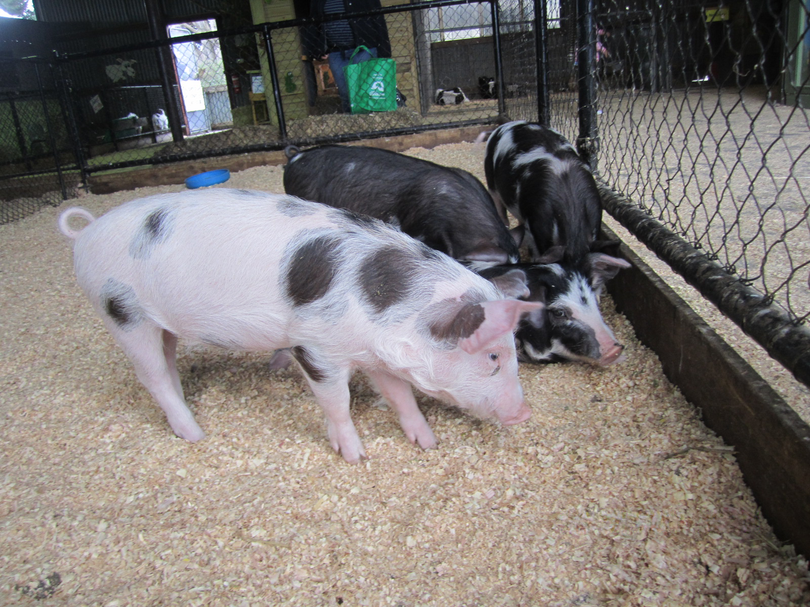 पाळीव वराह, डुक्कर